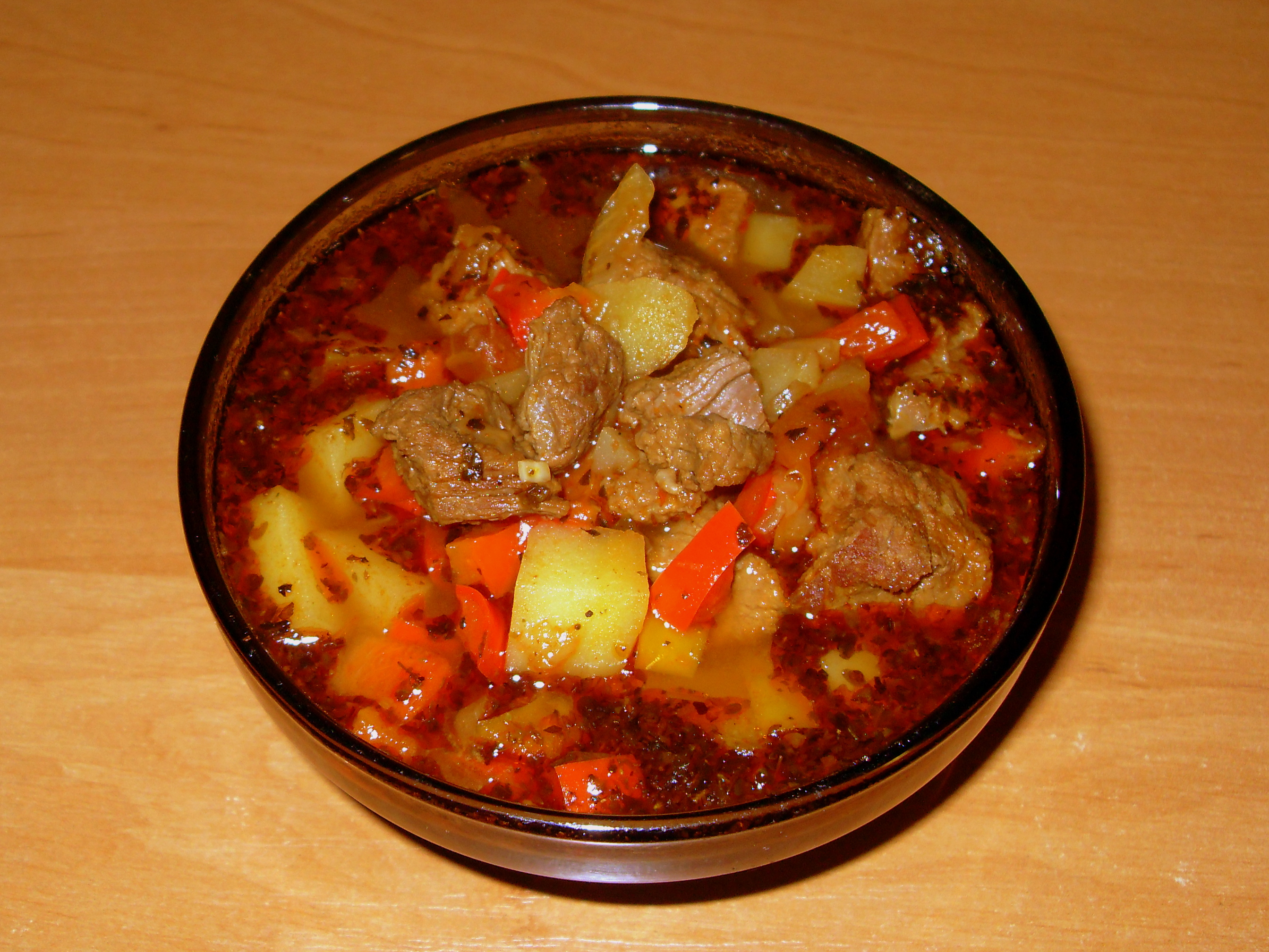 Zupa węgierska z przepisu Biedronki w wykonaniu autora zdjęcia. Widać sztandardowe składniki węgierskie: paprykę i mięso wołowe.